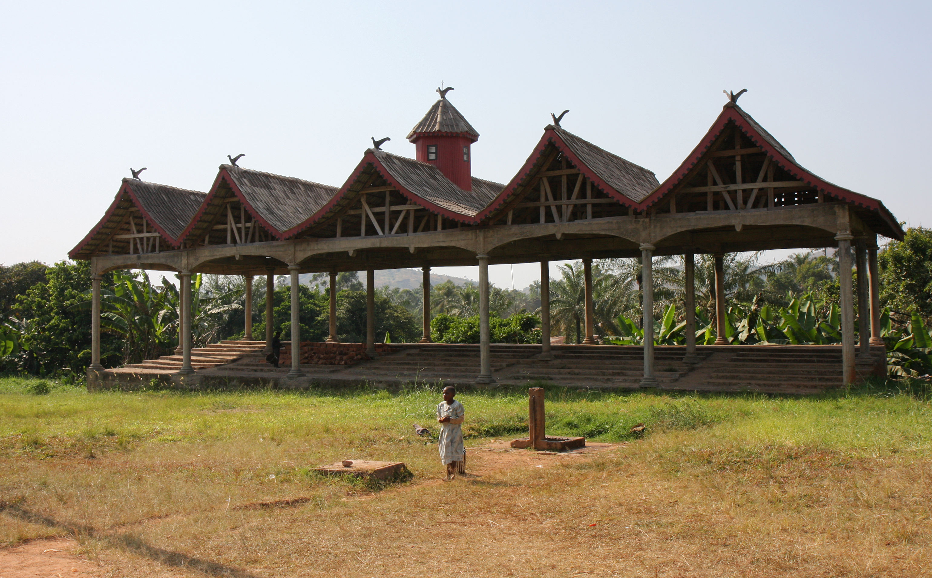 Chefferie de Bafut au nord de Bamenda